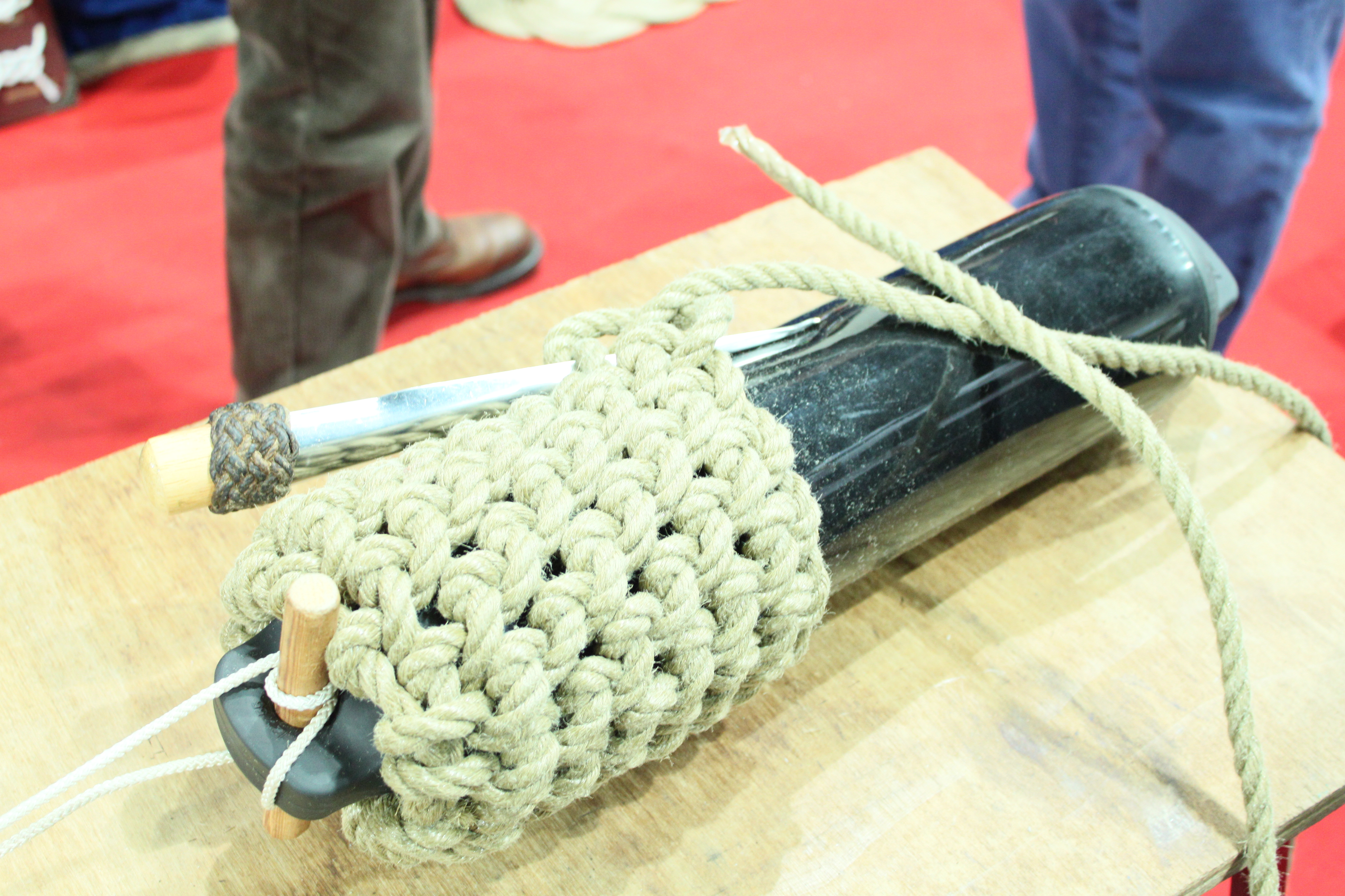 dekorativer Knoten , gesehen auf der Messe Bremen "Boot 2011" Fender